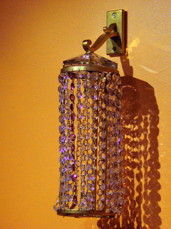 Exposition "La maison Leleu, 50 ans de mobilier et de décoration" au Musée des Années 30 - Espace Landowski